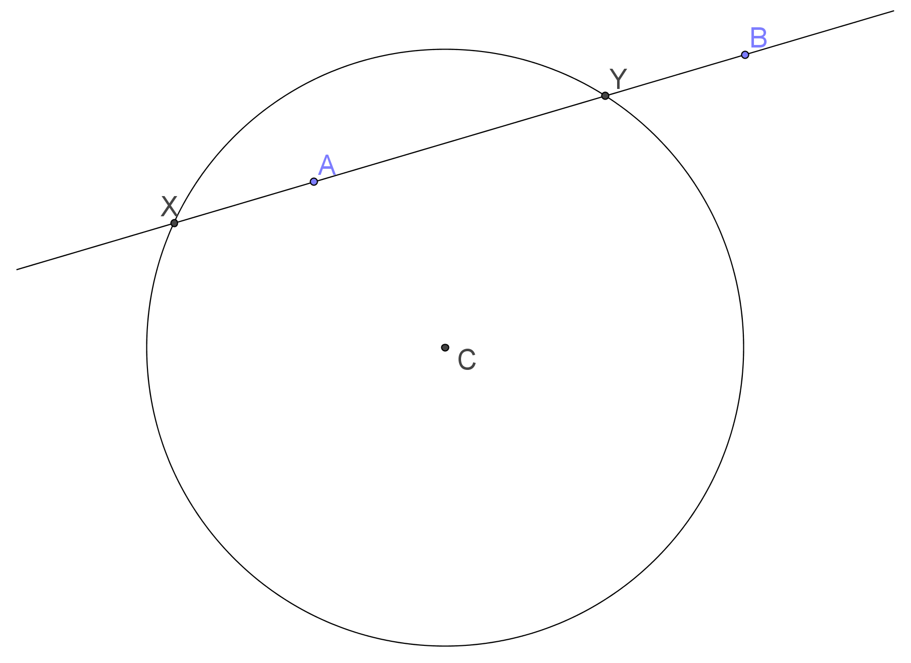 Duplicació del cub